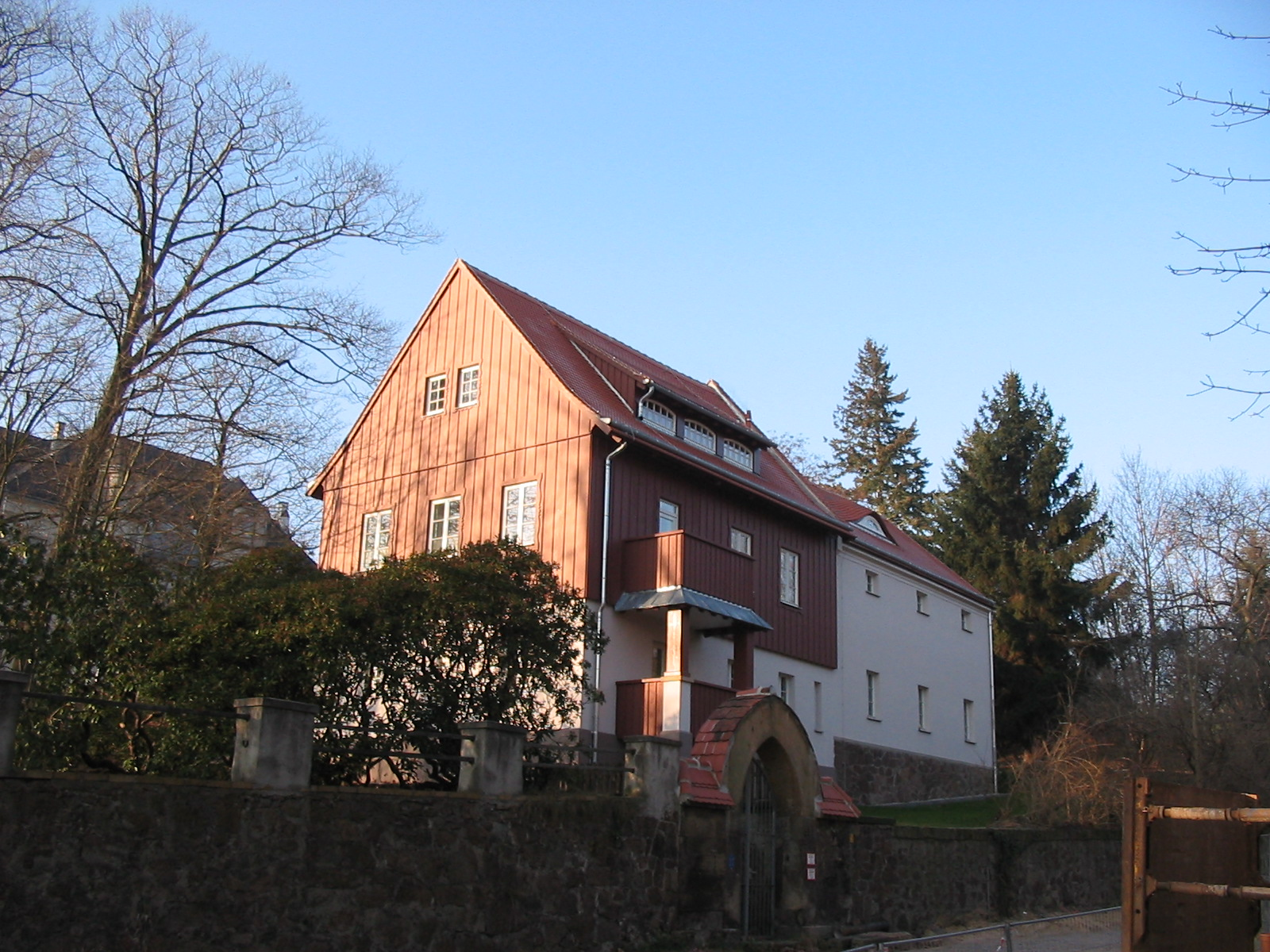 Radebeul Mohrenhaus Gärtnerhaus